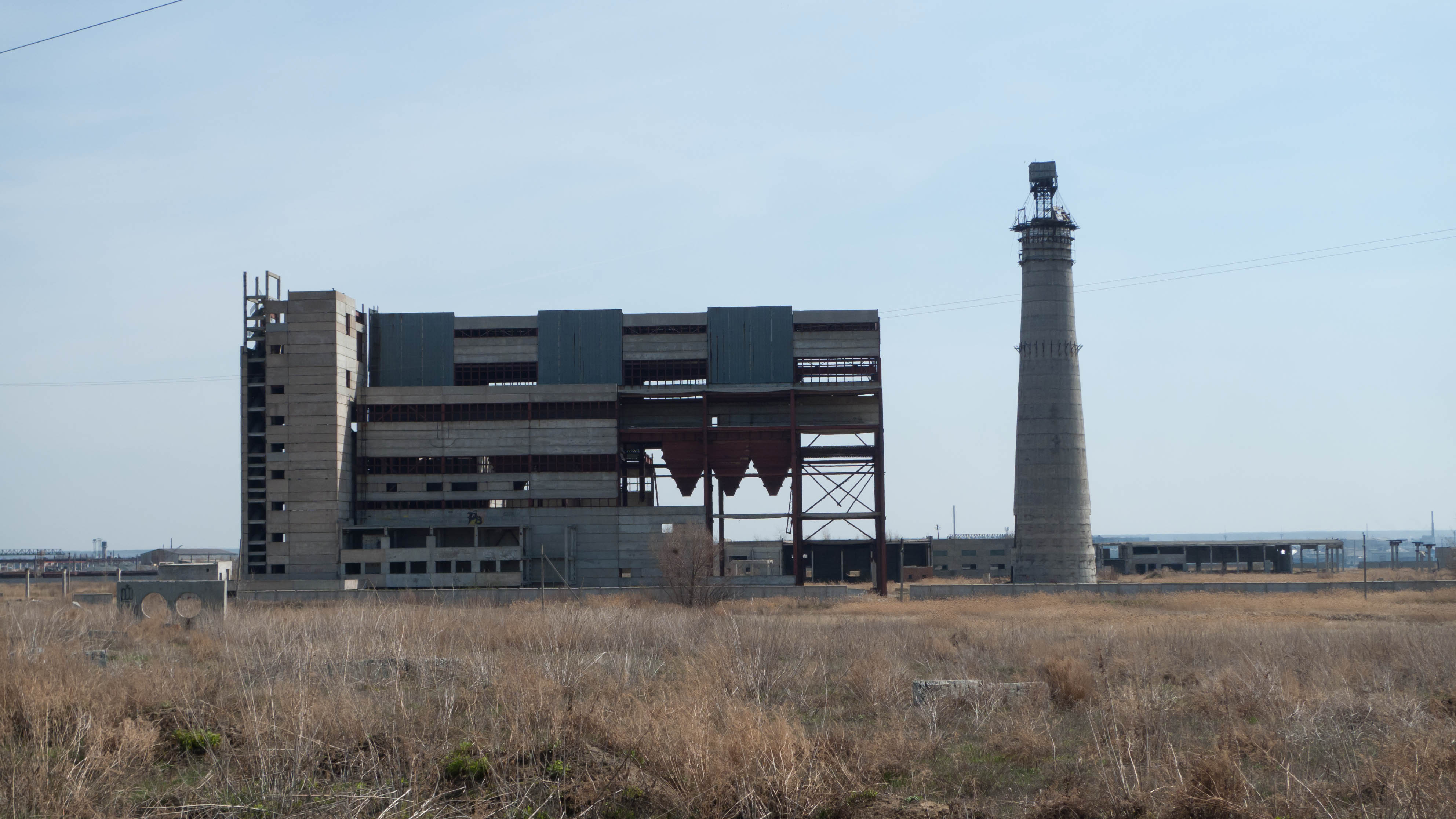 Недостроенный цех незавершенной строительством Северной водогрейной котельной